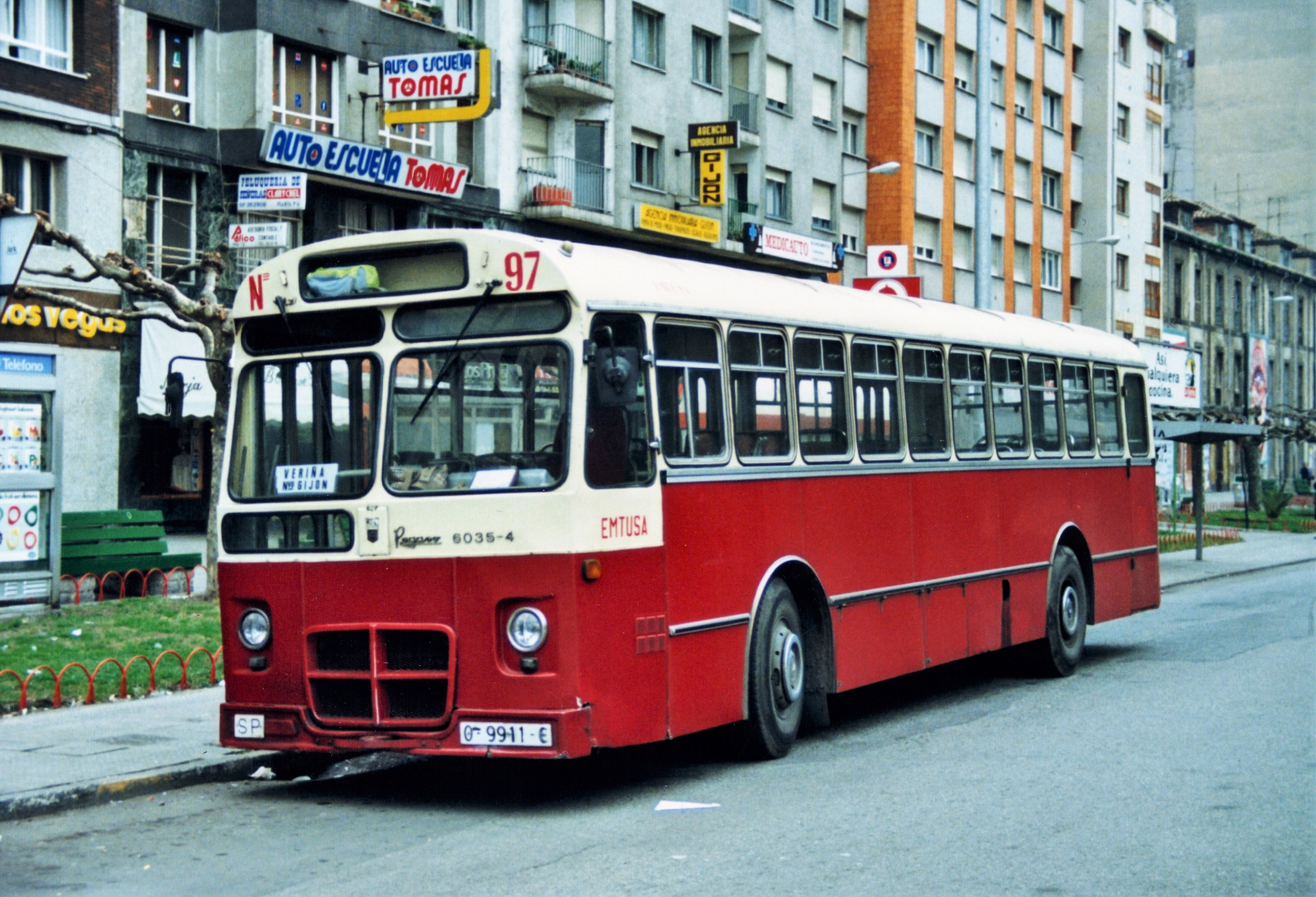 El autobús Pegaso 6035/4 número 97 de EMTUSA de Gijón descansando entre dos servicios en la Plaza del Humedal de Gijón.